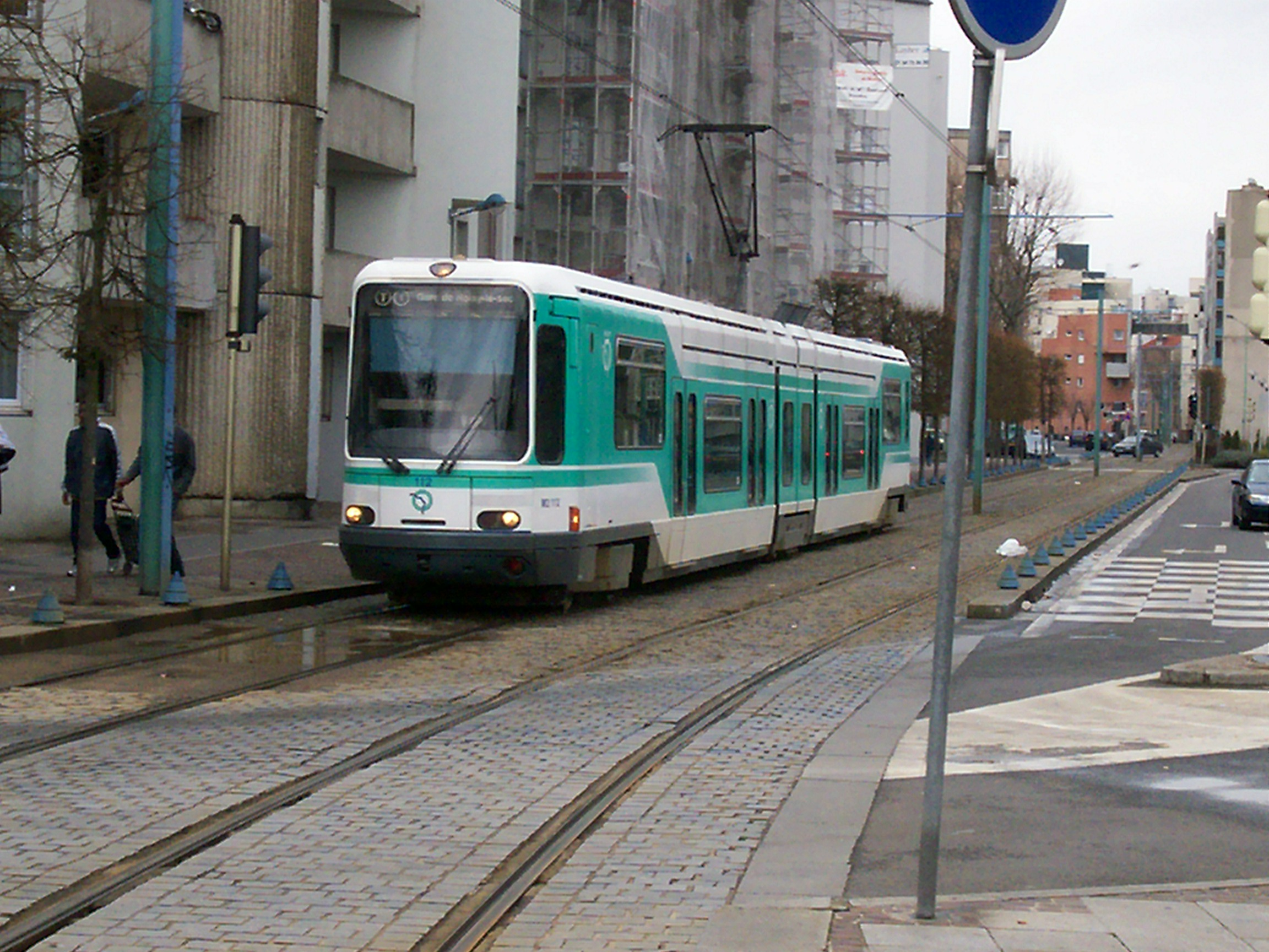 T1 à Cimetière de Saint-Denis